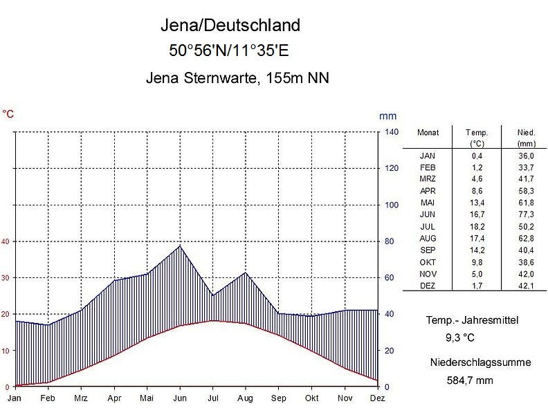 Jahresgang Temperatur und Niederschlag aus den Mittelwerten von 1961 - 1990